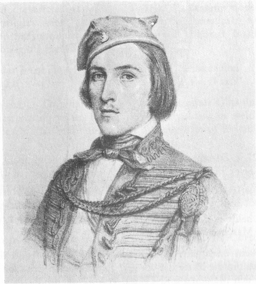 Studentenbild des Ludwig Clericus (1827-1892) als Senior des Corps Masovia in Königsberg (1851)